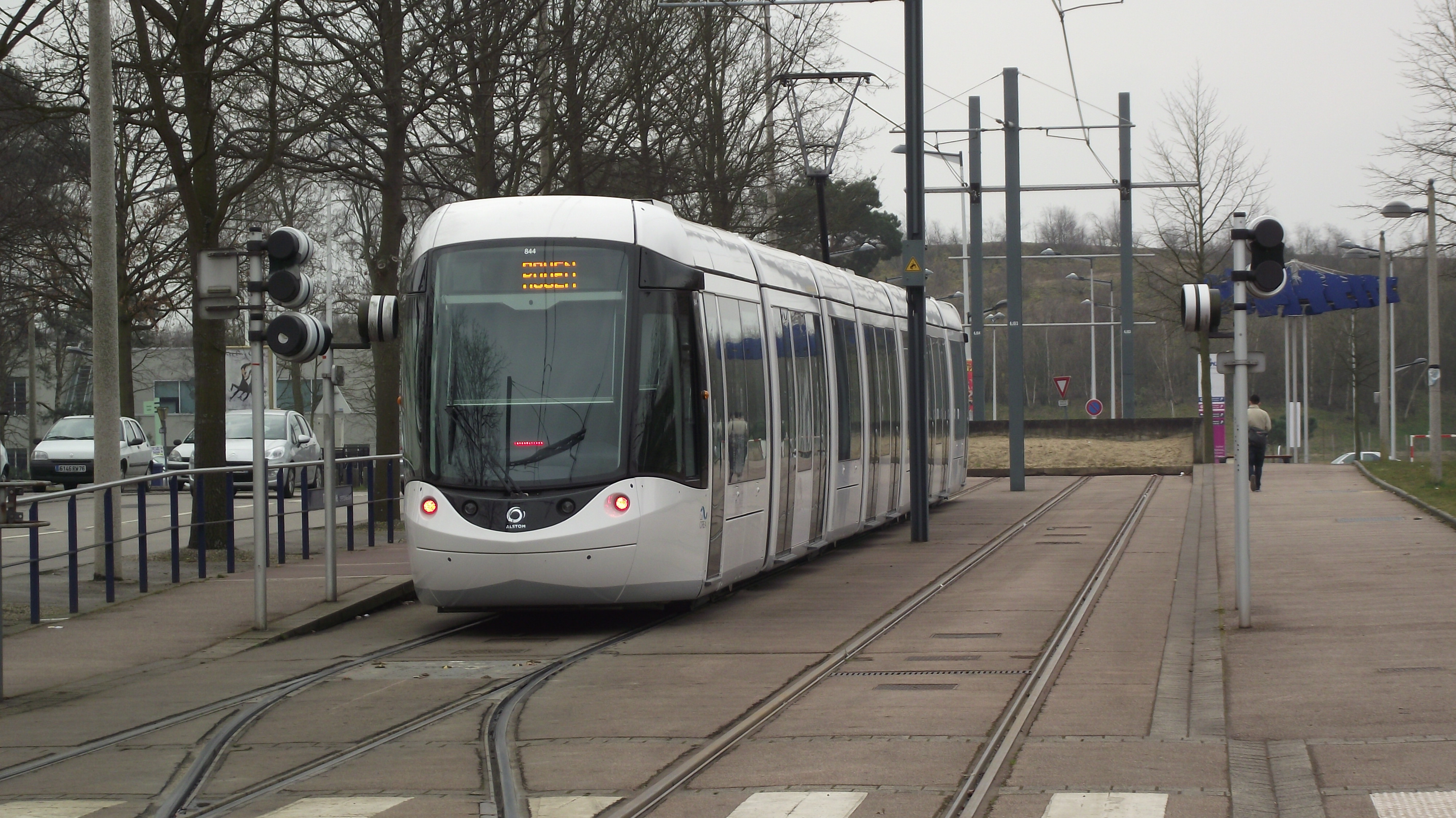 Citadis tram bij het Technopole eindpunt